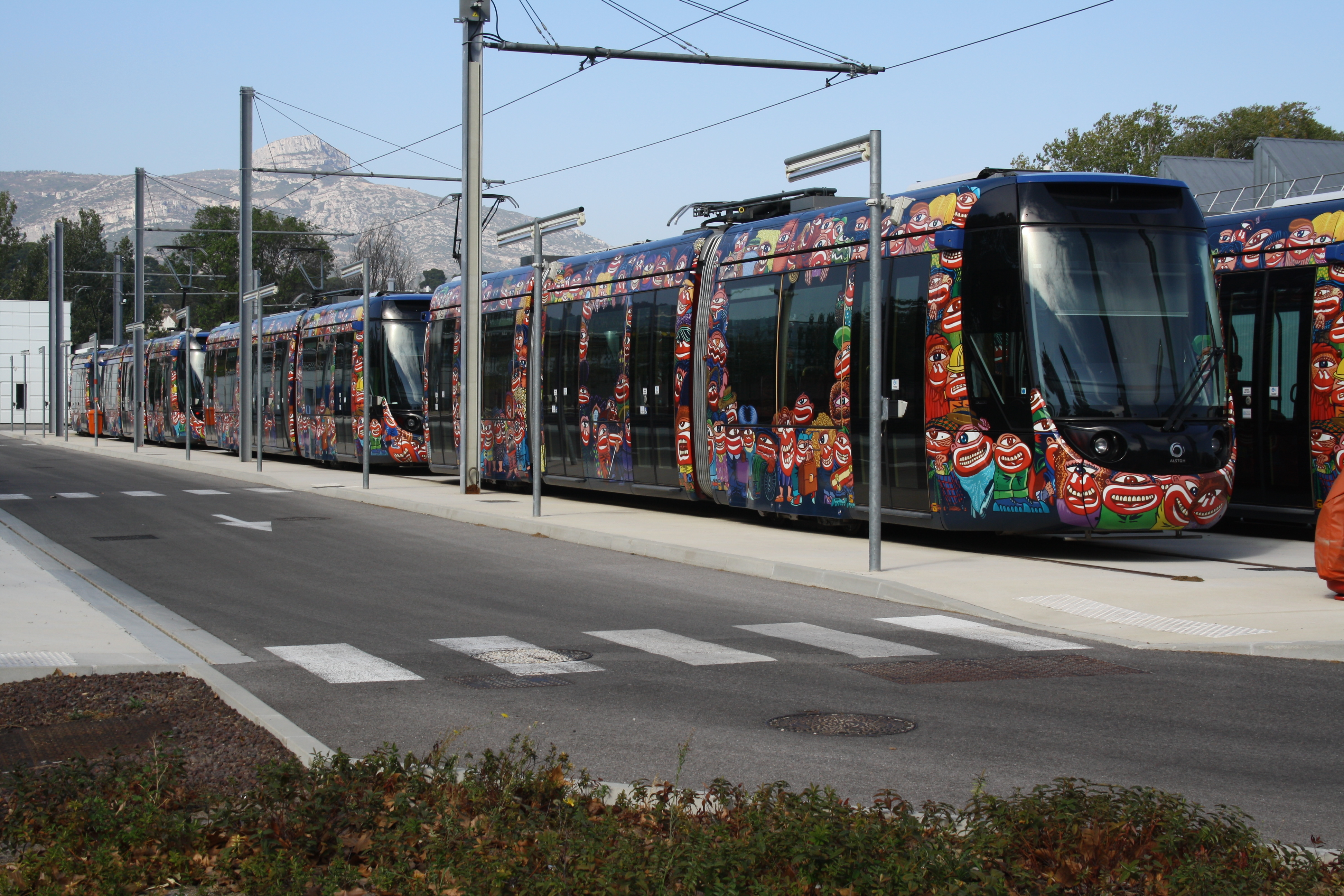 Des rames Citadis Compact à l'atelier d'Aubagne